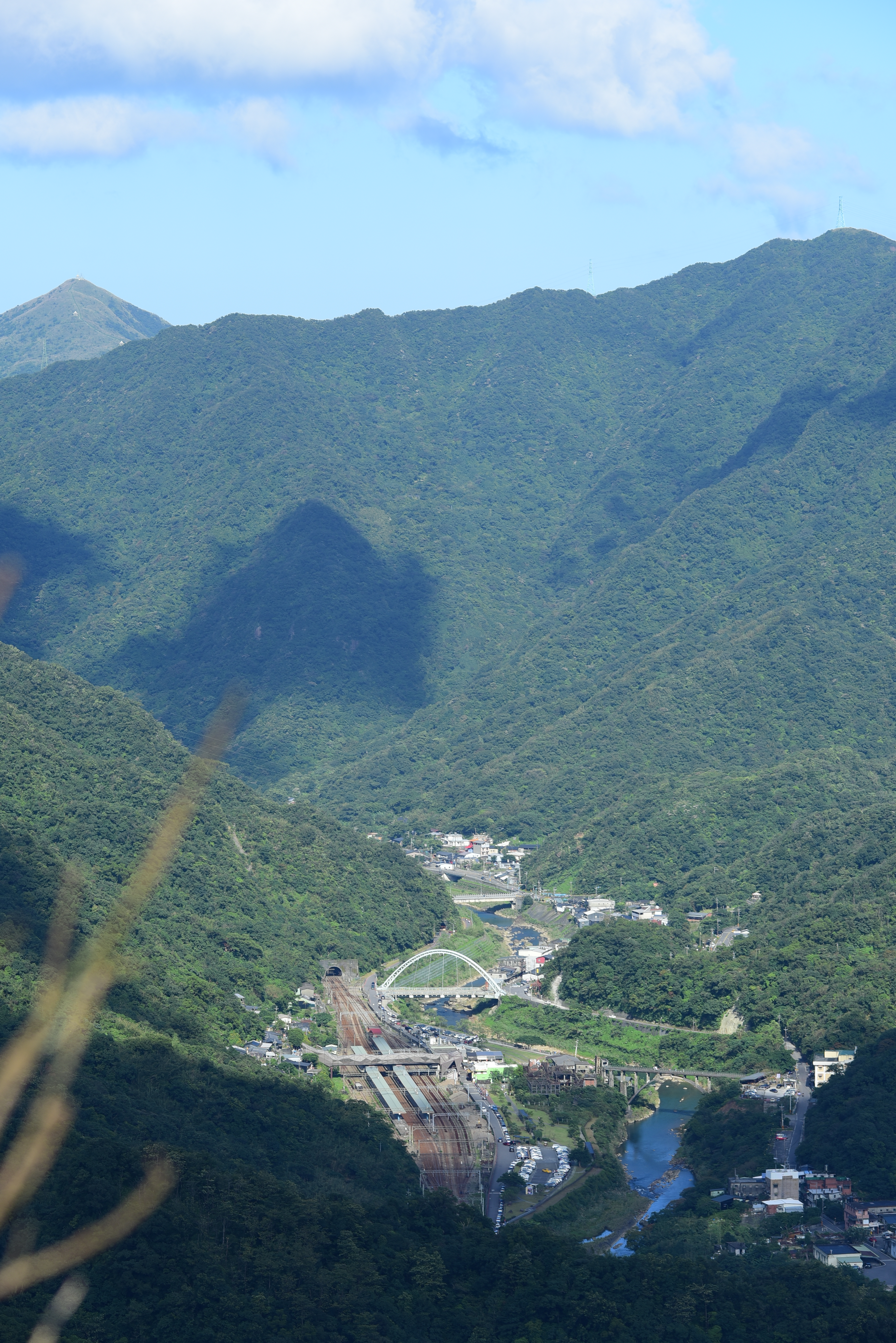 2018 TRA Houtong Station Area 新北市瑞芳區猴硐地區